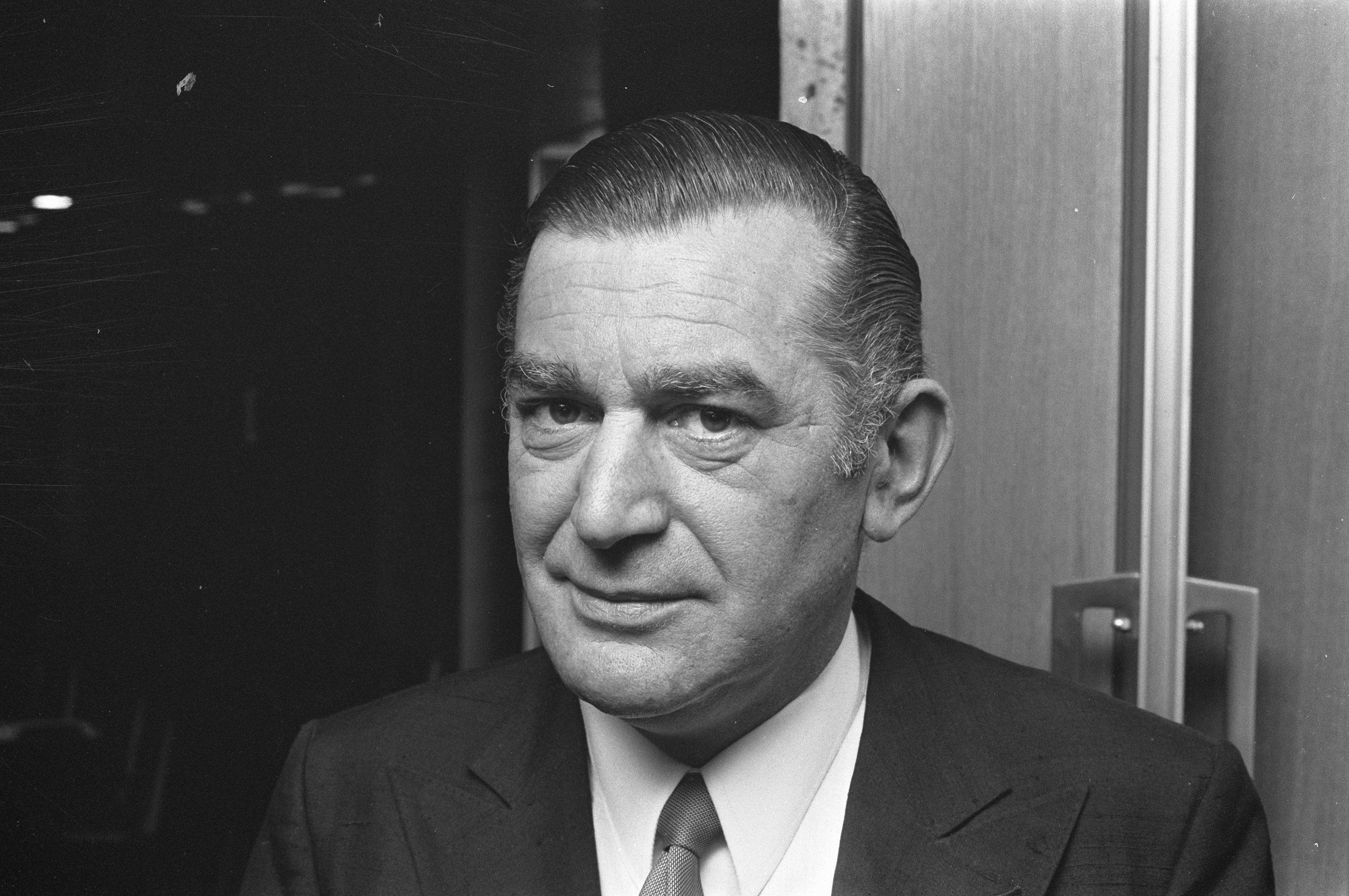 Collectie / Archief : Fotocollectie Anefo Reportage / Serie : [ onbekend ] Beschrijving : Algemene ledenvergadering Genootschap van Burgmeesters , Zaandam, ir. W. J. L. J. Merkx (kop) Datum : 10 november 1971 Locatie : Noord-Holland, Zaandam, Zaanstad Trefwoorden : ledenvergaderingen Persoonsnaam : merkx Fotograaf : Evers, Joost / Anefo Auteursrechthebbende : Nationaal Archief Materiaalsoort : Negatief (zwart/wit) Nummer archiefinventaris : bekijk toegang 2.24.01.05 Bestanddeelnummer : 925-1234